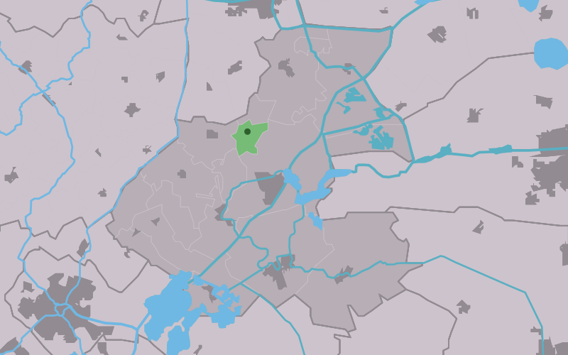 Kaartsje fan himrik fan Idaerd